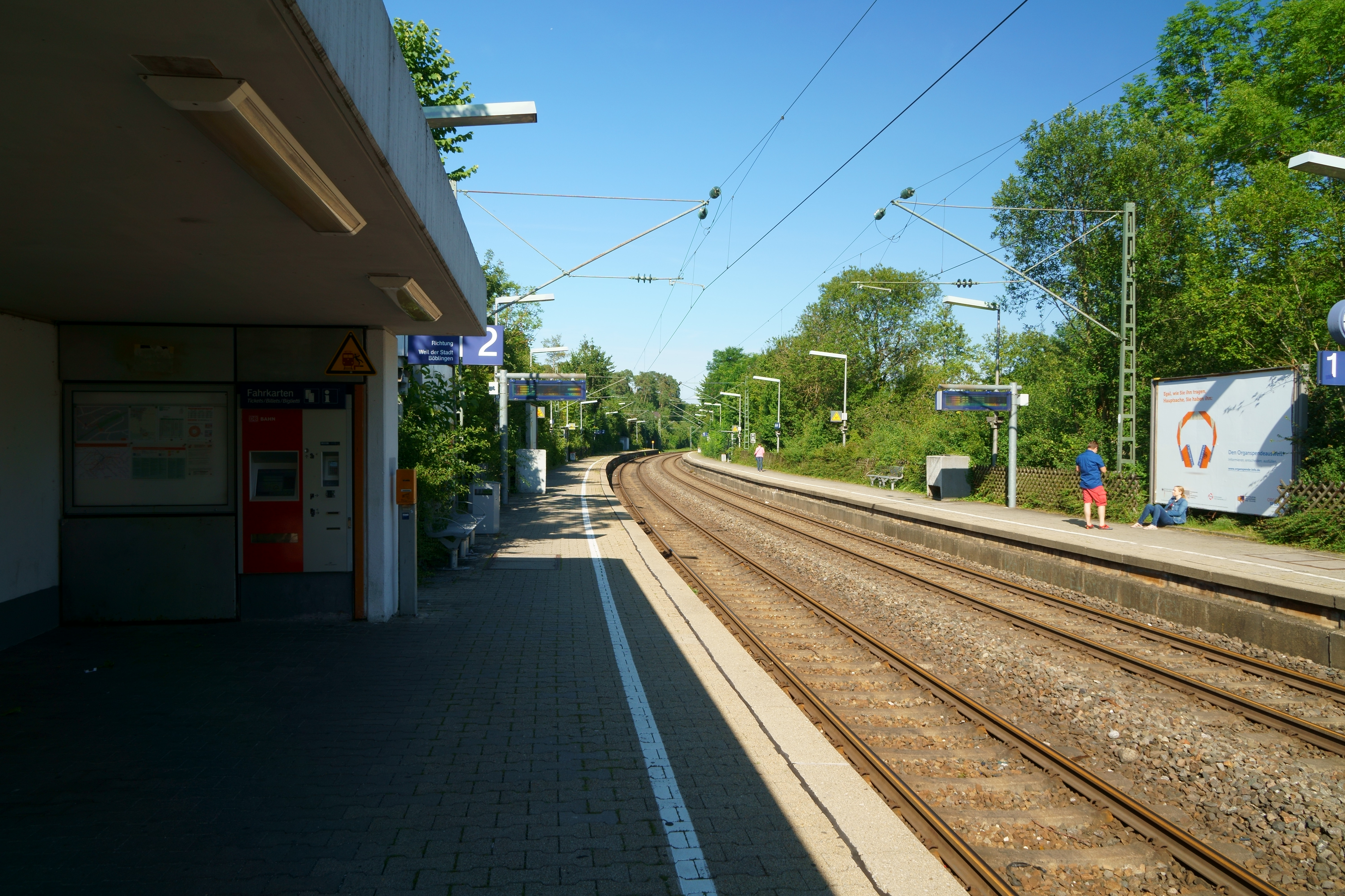 Bahnhof Rutesheim